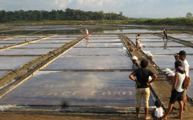 Saltfarm in Dasol, Pangasinan, Philippines.